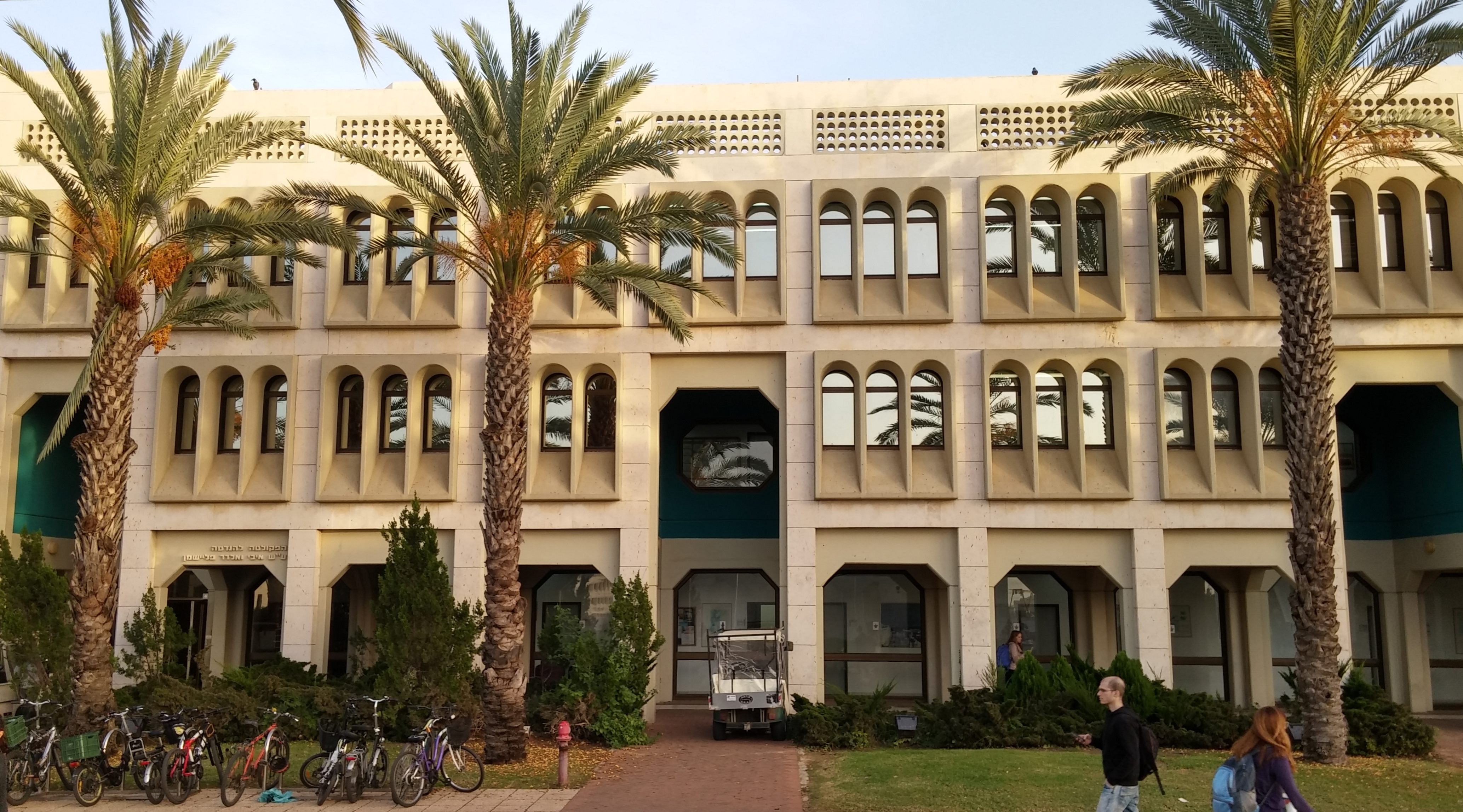 מבנייני הפקולטה להנדסה, אוניברסיטת תל אביב